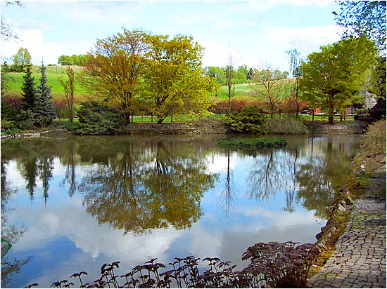 Arboretum w Wojsławicach, woj. dolnośląskie